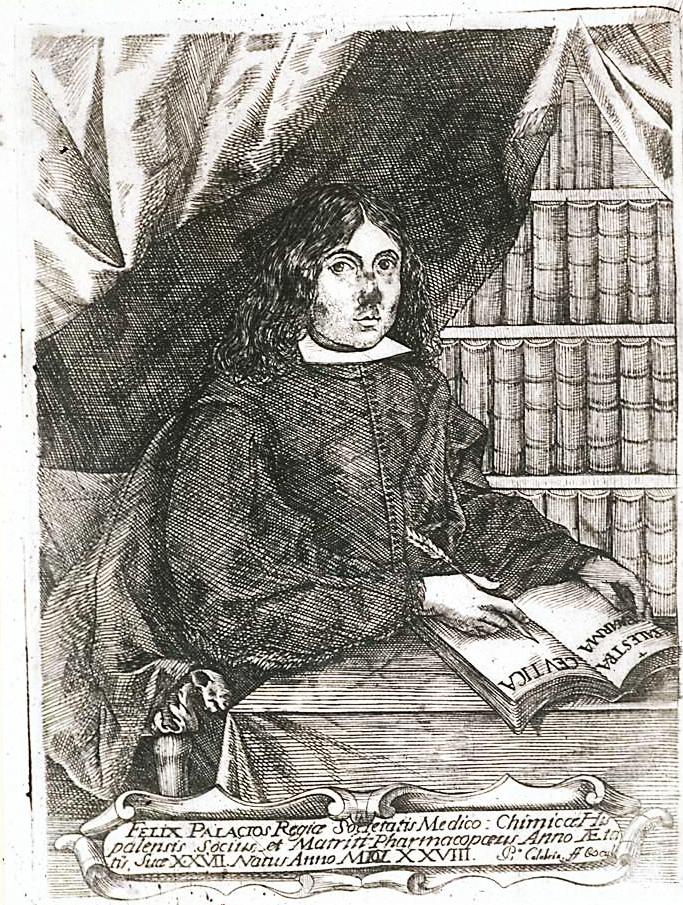 Retrato de Félix Palacios, grabado de Pedro de Calabria ilustración de la Palestra pharmaceutica, impresa en Madrid en 1706 por Juan García Infanzón.